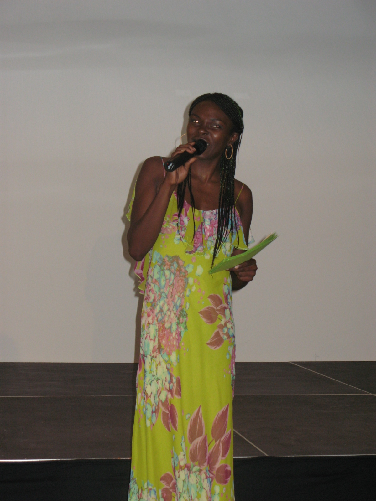 Marie-Edwige Hartig (Linzer Gemeinderätin) beim Wahlkampfauftakt 2009